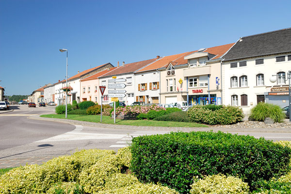 Vue de la bourgade depuis la N3.